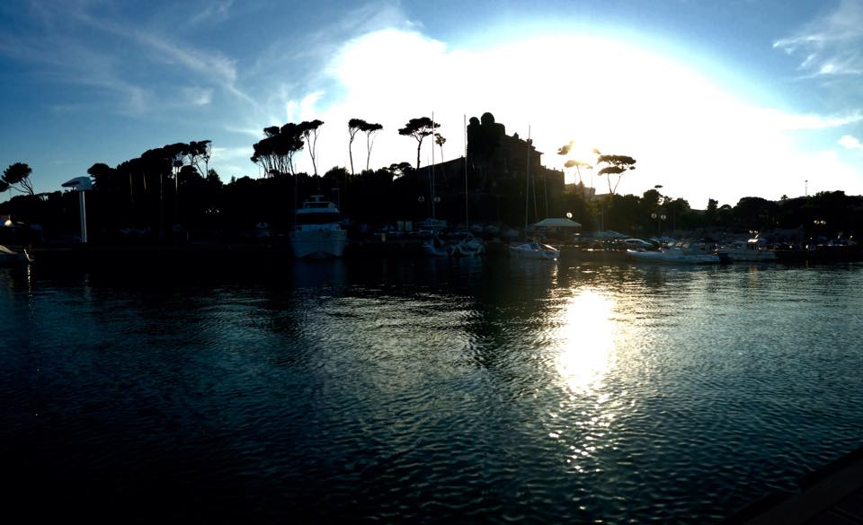 Vista dal porto di Santa Marinella